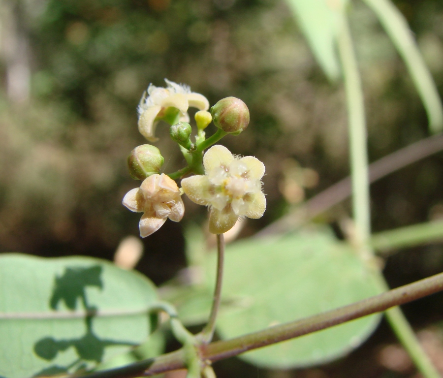 Macroditassa adnata - ASCLEPIADACEAE - Parque Estadual Serra dos Pirineus - Pirenópolis - Goiás - Brasil.